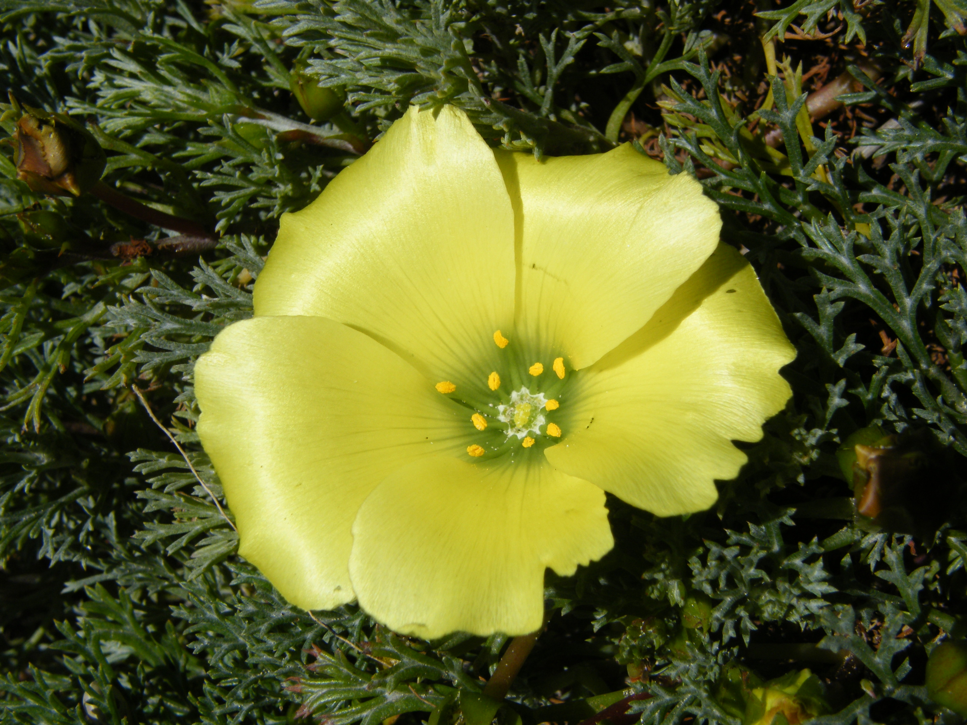 Duikerwortel